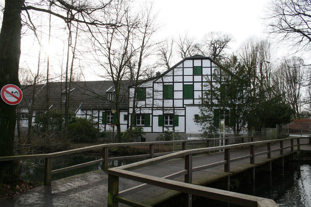 Wohnhaus von Gottlob Jacobi an der Antony-Hütte (Oberhausen)